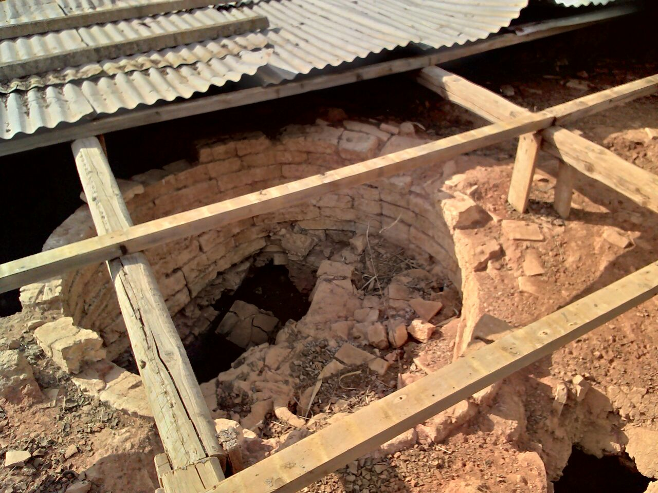 Resti di antiche fornaci romane nel territorio di Alcamo (Alcamo Marina).